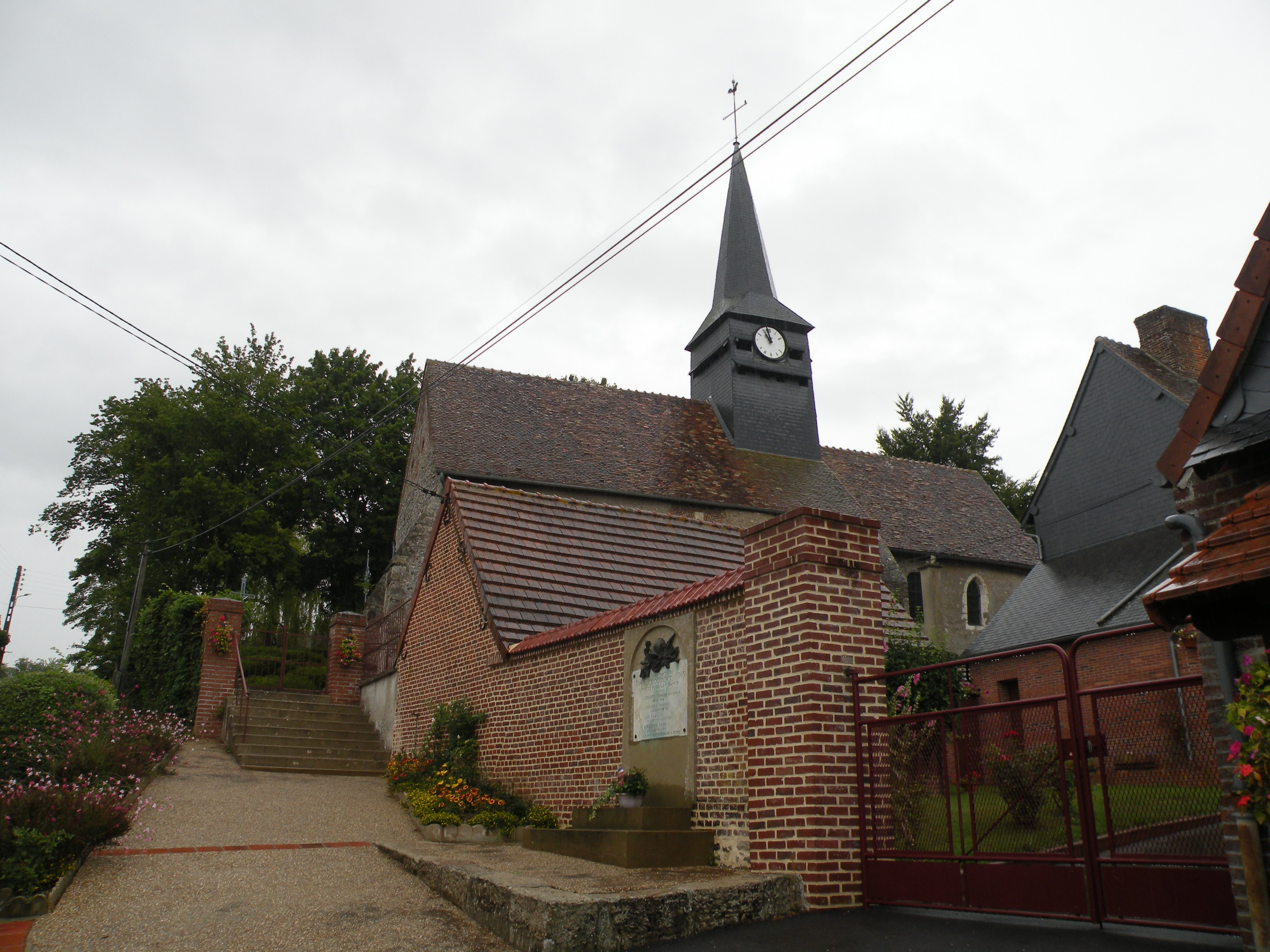 Vrocourt